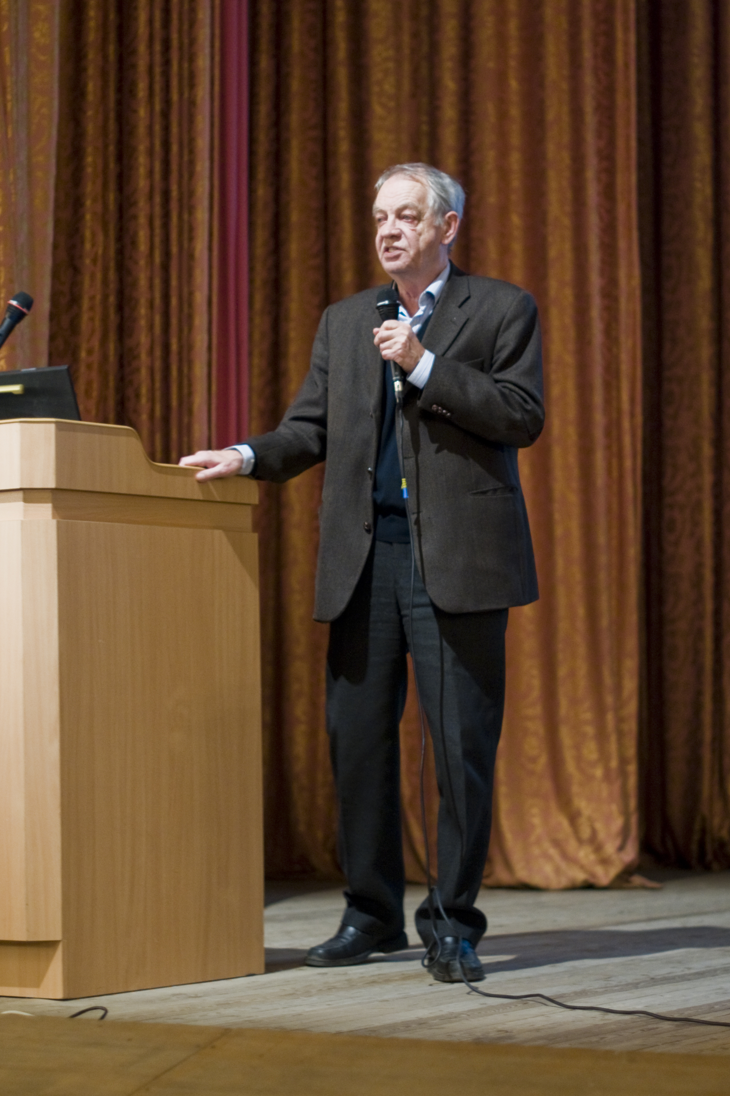 Виктор Петрович Иванников — директор Института системного программирования РАН, академик РАН (с 29 мая 2008 года), главный редактор журнала «Программирование», заведующий кафедрами системного программирования на факультете ВМиК МГУ и в Московском Физико-Техническом Институте. Выпускник кафедры Электронно-счётных машин ФРТК МФТИ.